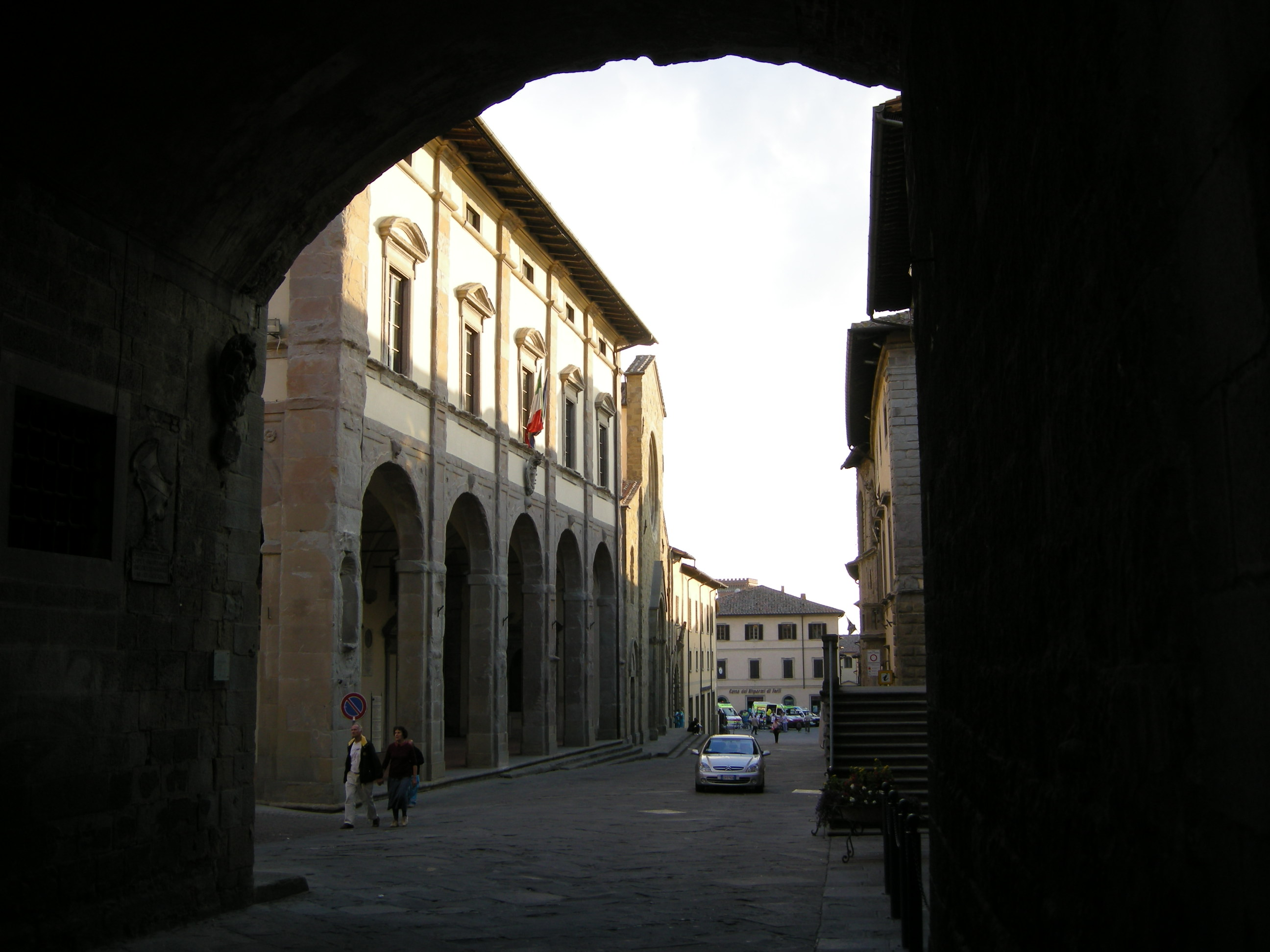 Sansepolcro, via G. Matteotti 01 da arco della pesa